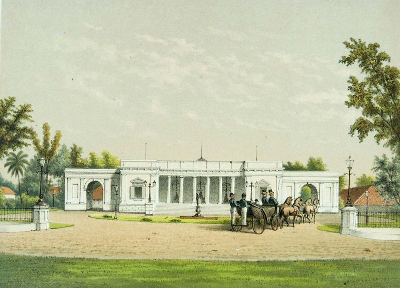 Litho. Litho naar een oorspronkelijke aquarel van J. Rappard.. Het paleis van de gouverneur- generaal op het Koningsplein in Batavia